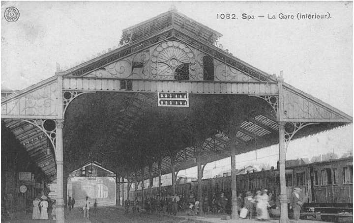 Gare de Spa intérieur.jpg